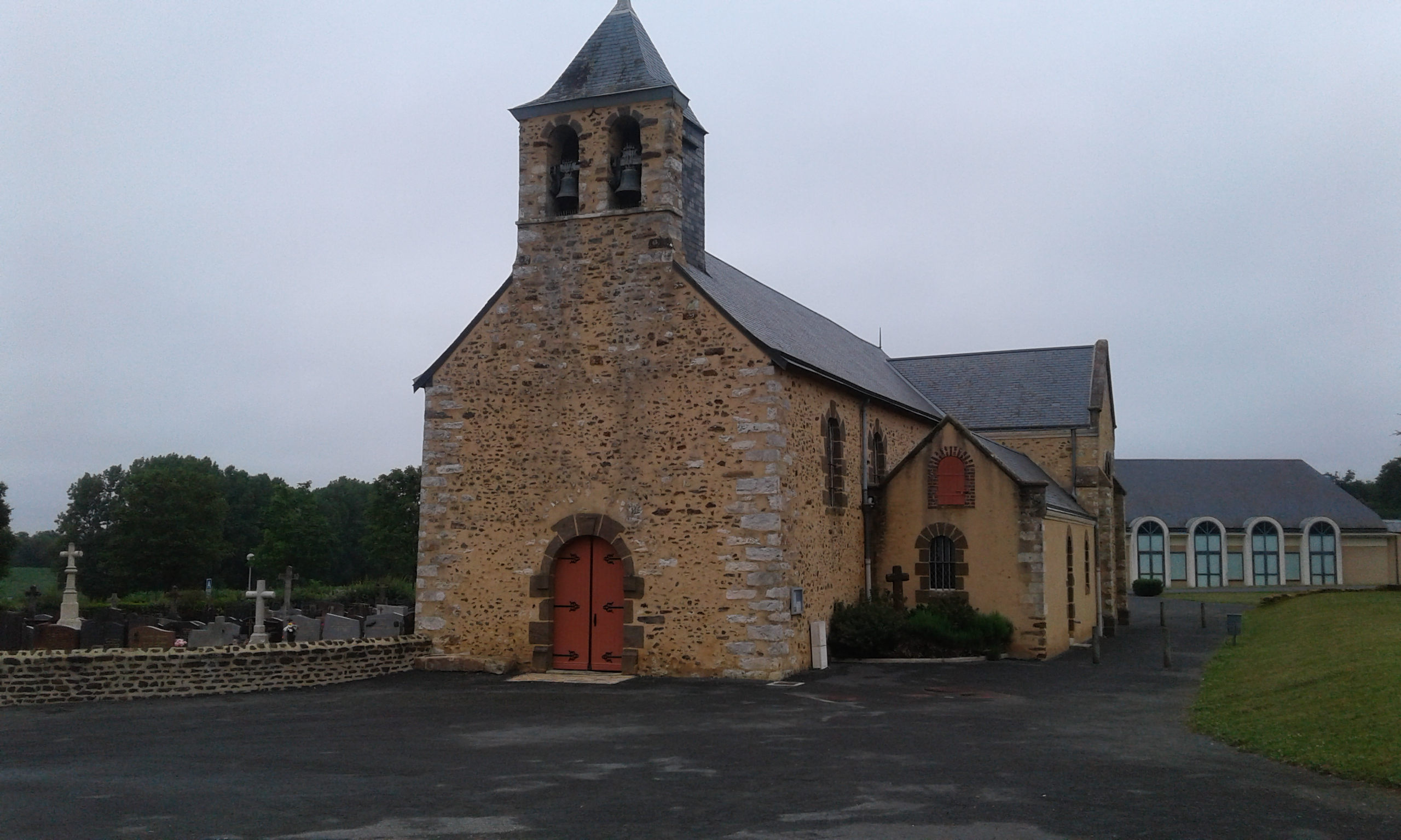 Eglise Trangé - Sarthe - France